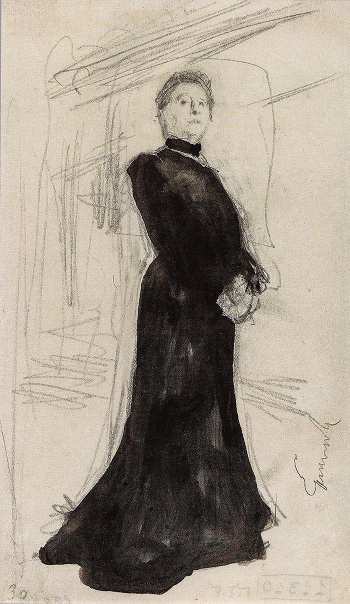 Эскиз портрета М. Н. Ермоловой 1905